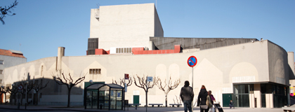 Façana principal del Teatre de La Passió d'Olesa